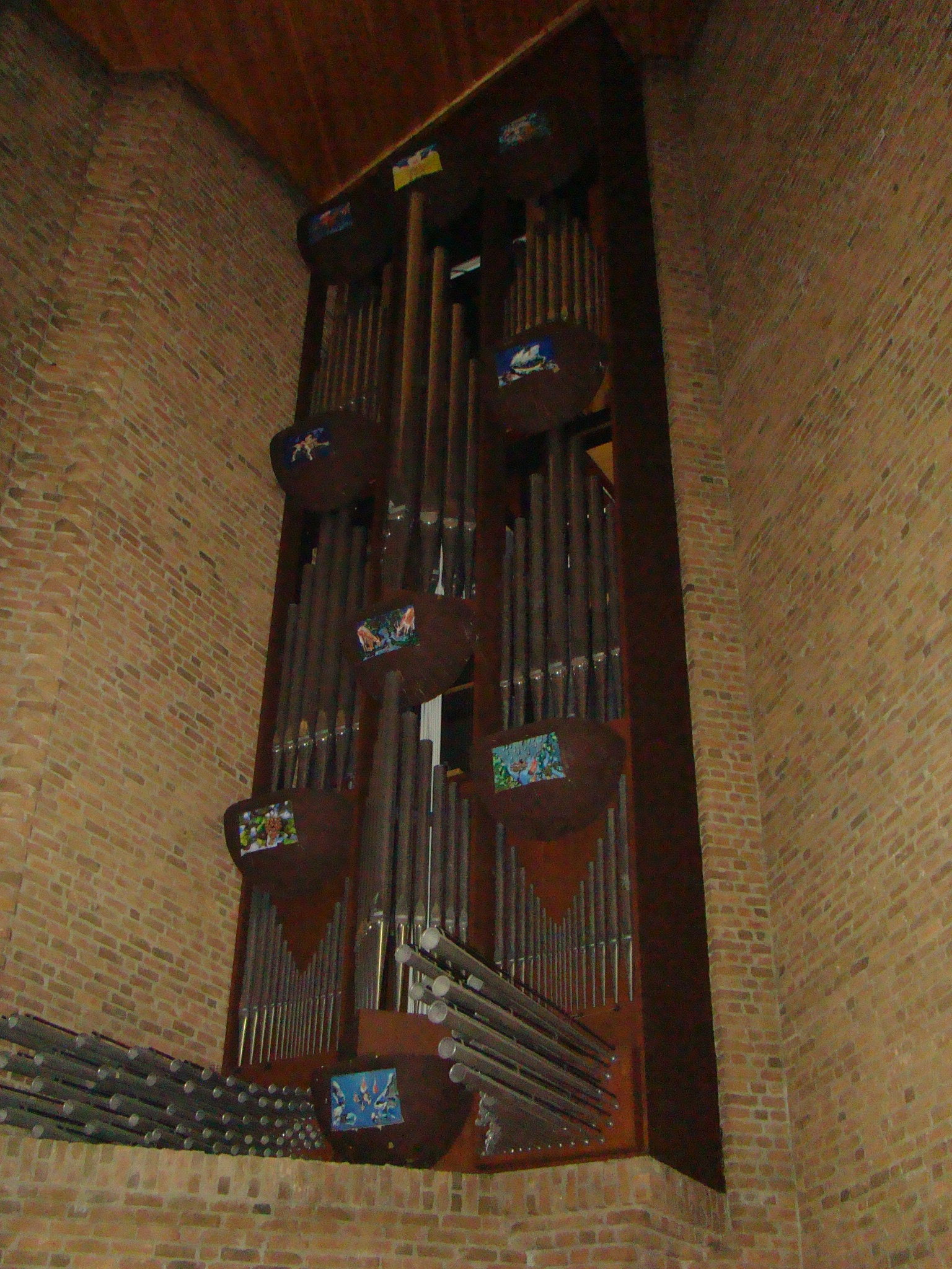 St. Kilian in Assamstadt